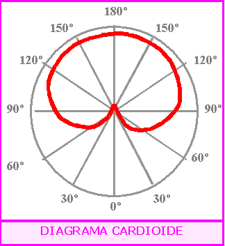 Esquema unidireccional.